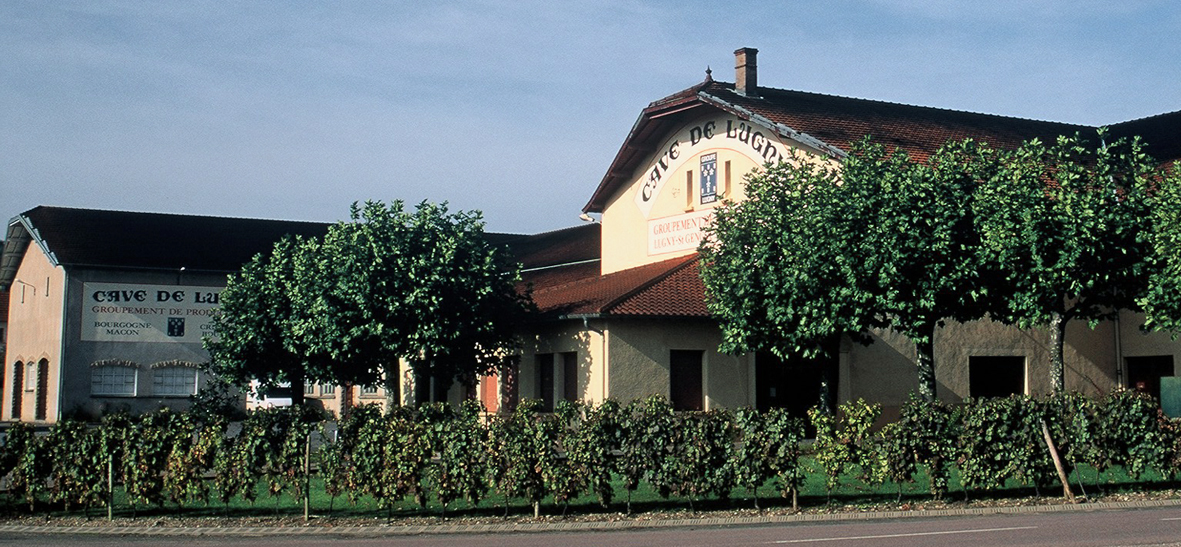 La cave coopérative vinicole de Lugny. Auteur Photographie personnelle prise et mise en ligne par Frikar.